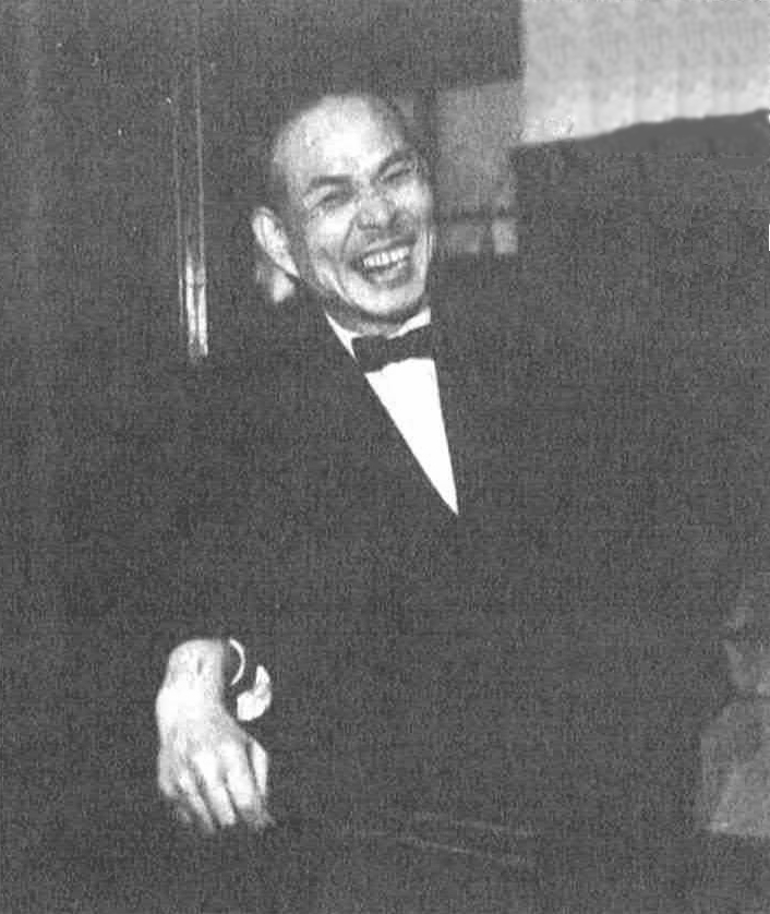 読売新聞社『家庭よみうり』377号（1954年）より松旭斎天洋。一部キャプションの塗りつぶしあり。